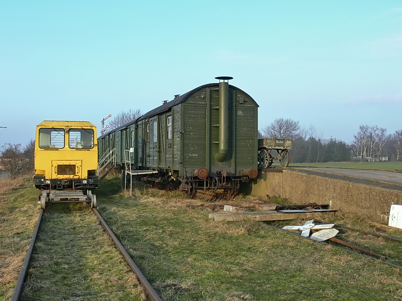 Ausstellung "Kunst auf Schienen"